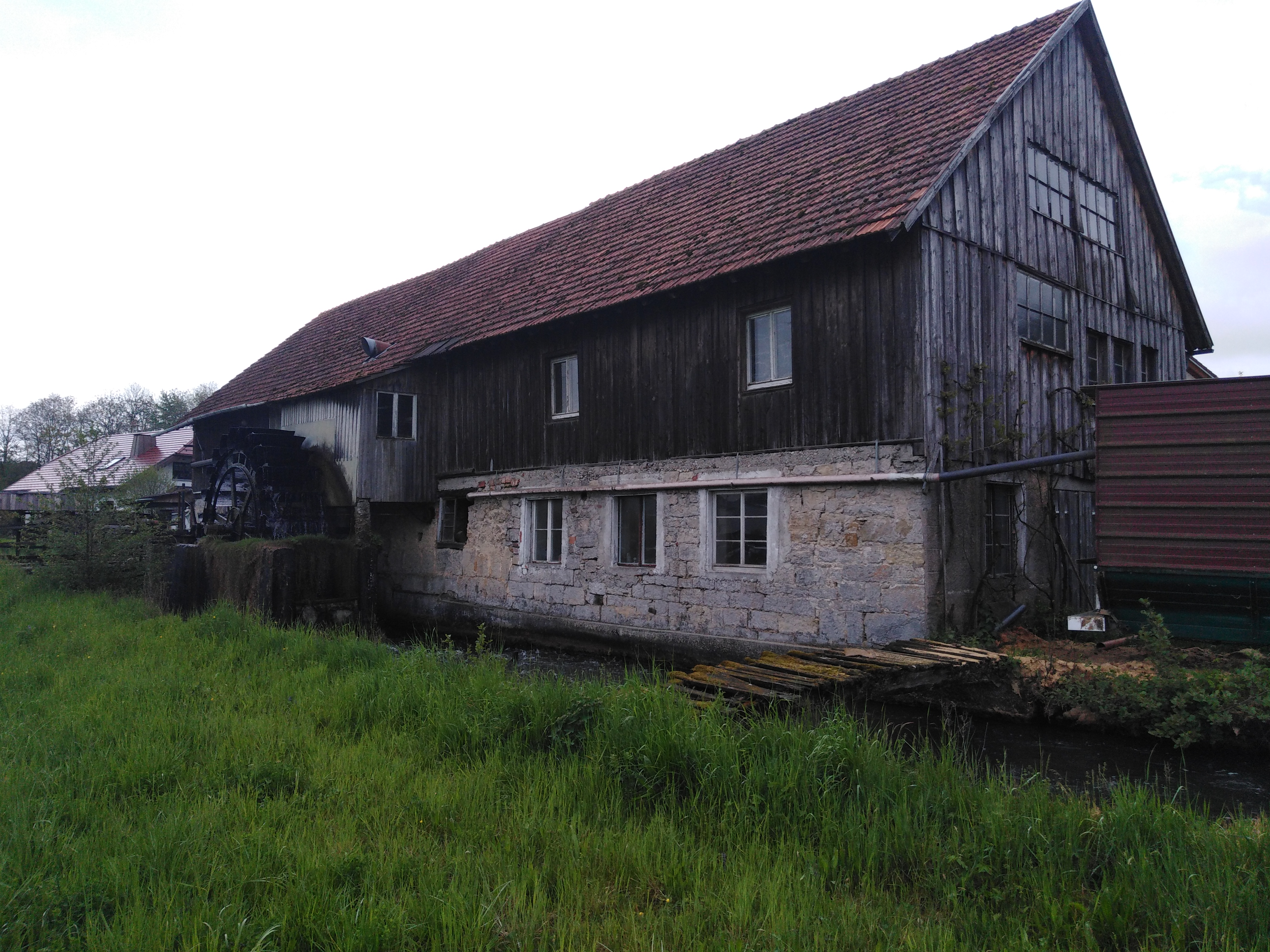 Lauchringen, Gemeinde im Landkreis Waldshut in Baden Württemberg. Die Bannmühle in Oberlauchringen.